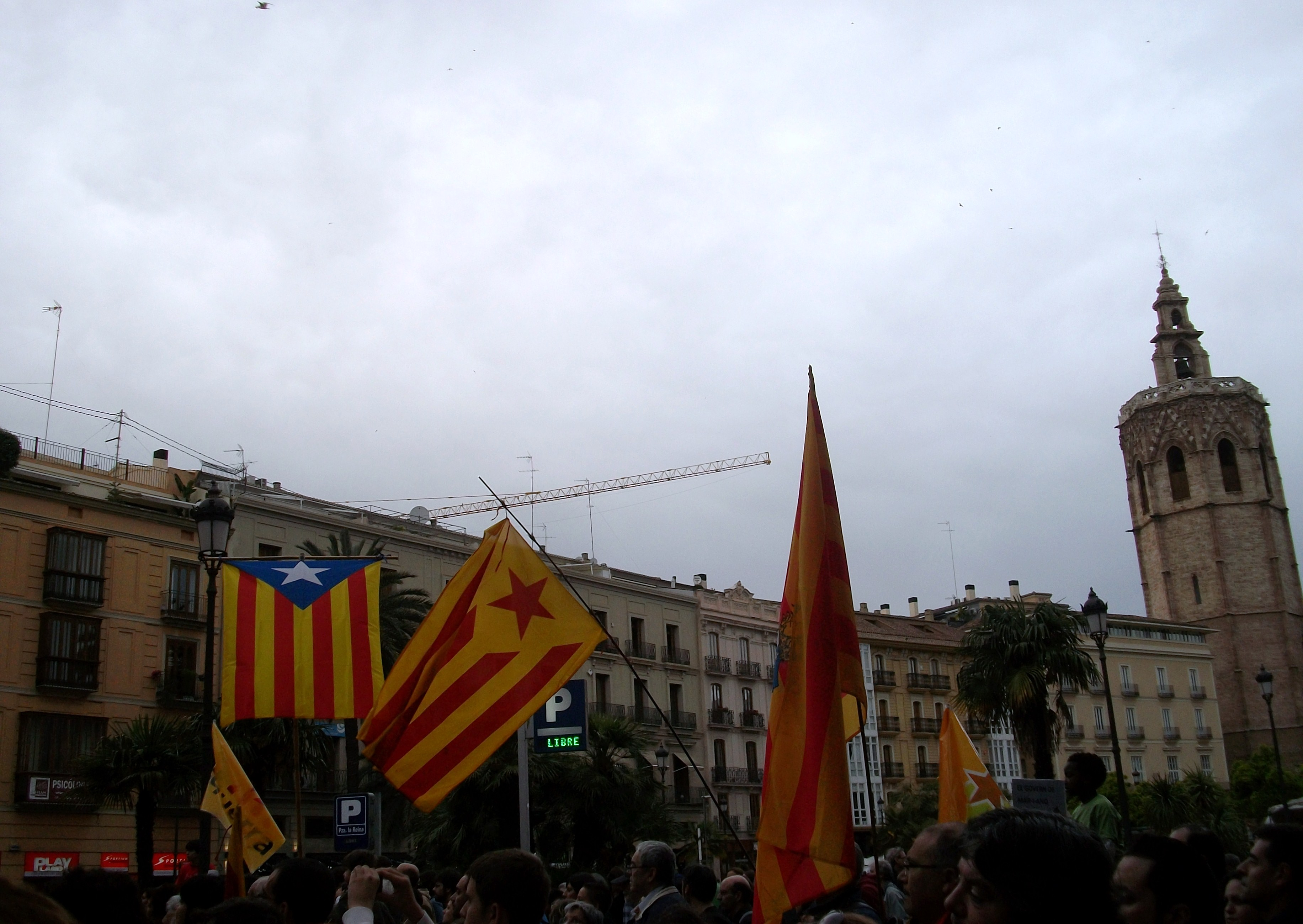 Final de la manifestació del 25 d'abril, València, plaça de la Reina.